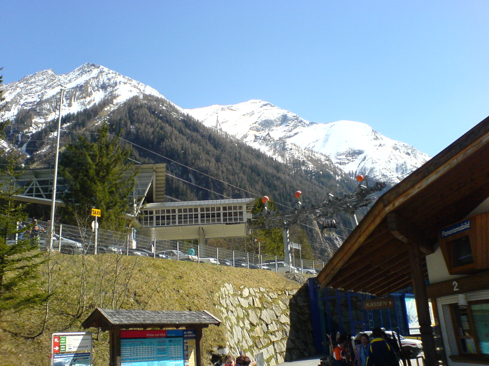 Die Talstation der Panoramabahn am Kitzsteinhorn, Kitzsteinhorn (Österreich)